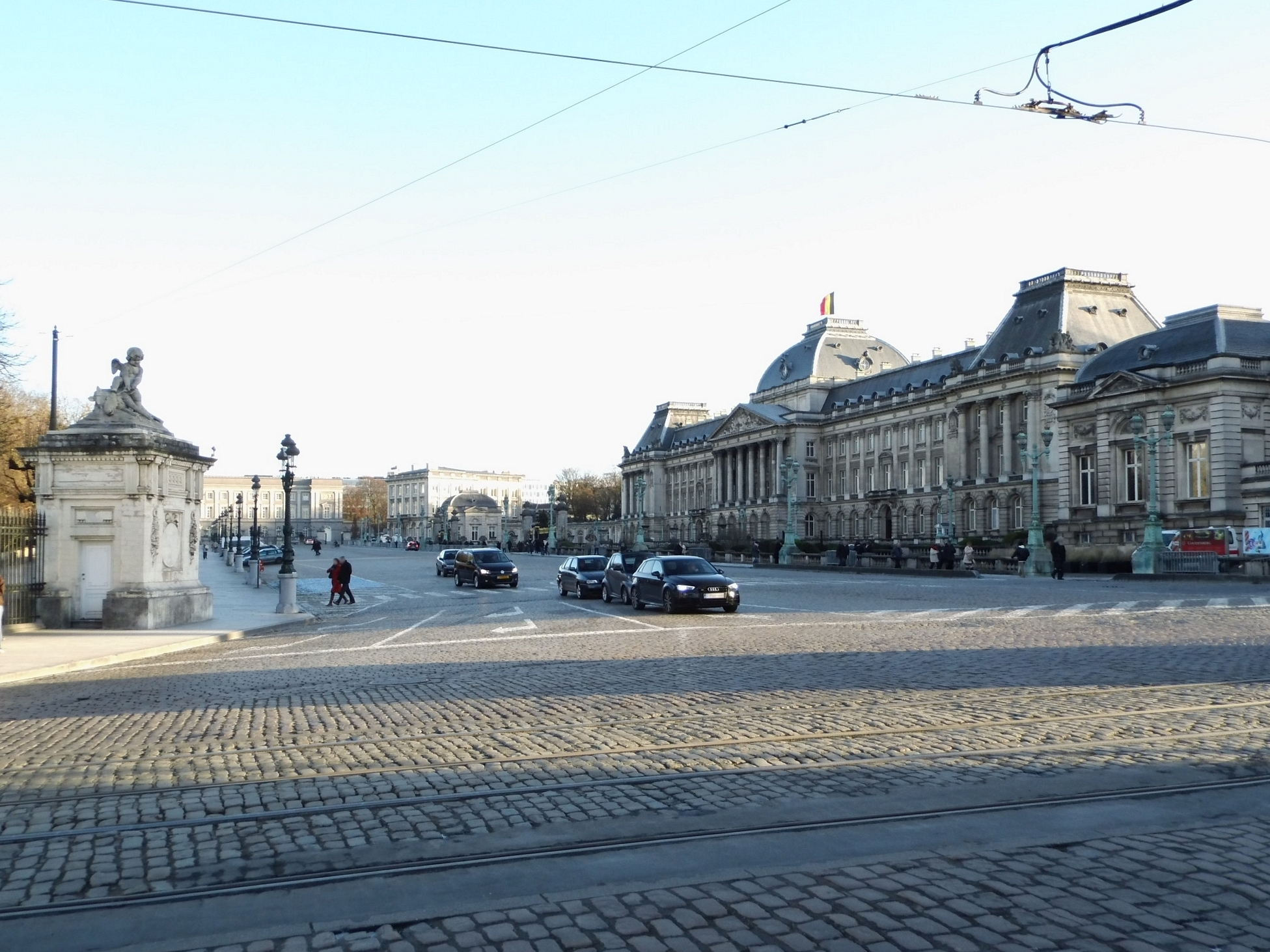 Paleizenplein (Zijaanzicht). Zicht op het Koninklijk Paleis en op het Paleis der Academiën.